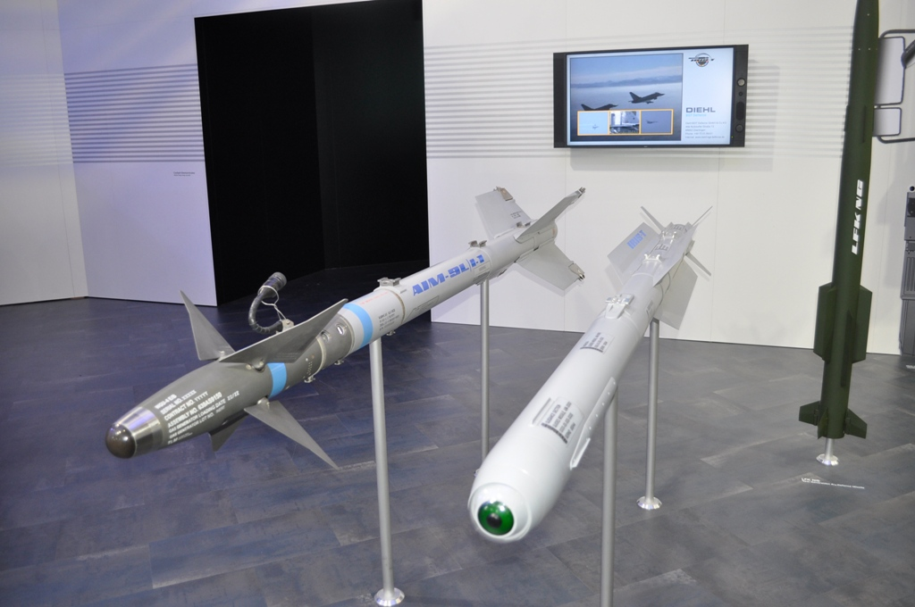 Stand Diehl BGT Defence au Salon du Bourget 2011, de gauche à droite AIM-9L IRIS-T LFK NG